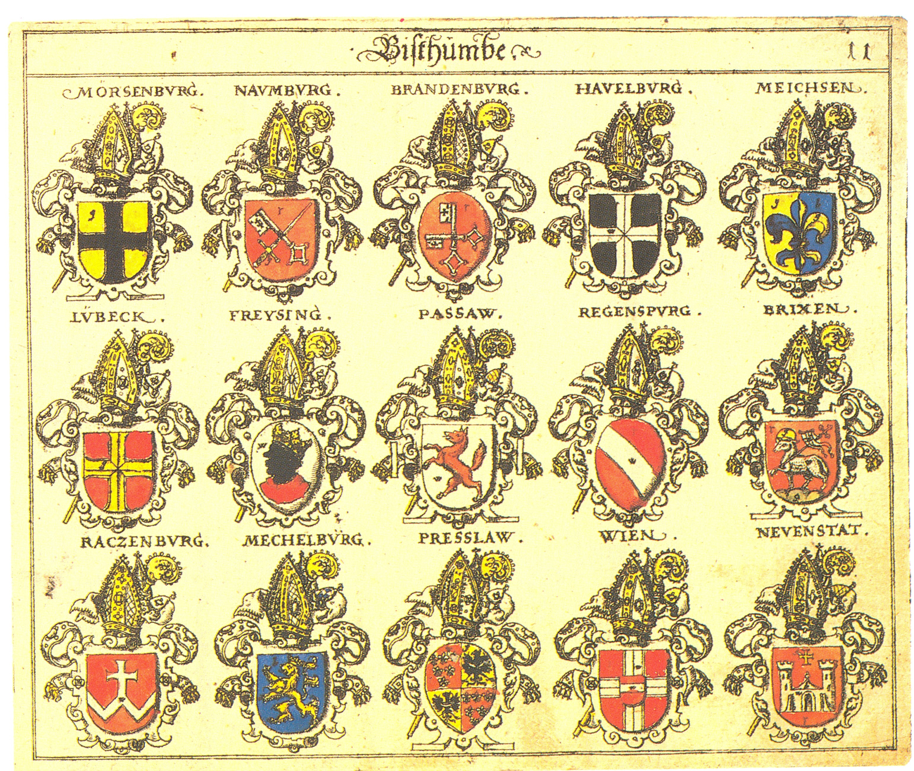 Johann Siebmacher: New Wappenbuch Bistümer Blatt 11 eingescannt aus: Horst Appuhn (Hrsg.), Johann Siebmachers Wappenbuch. Die bibliophilen Taschenbücher 538, 2. verb. Aufl , Dortmund 1989